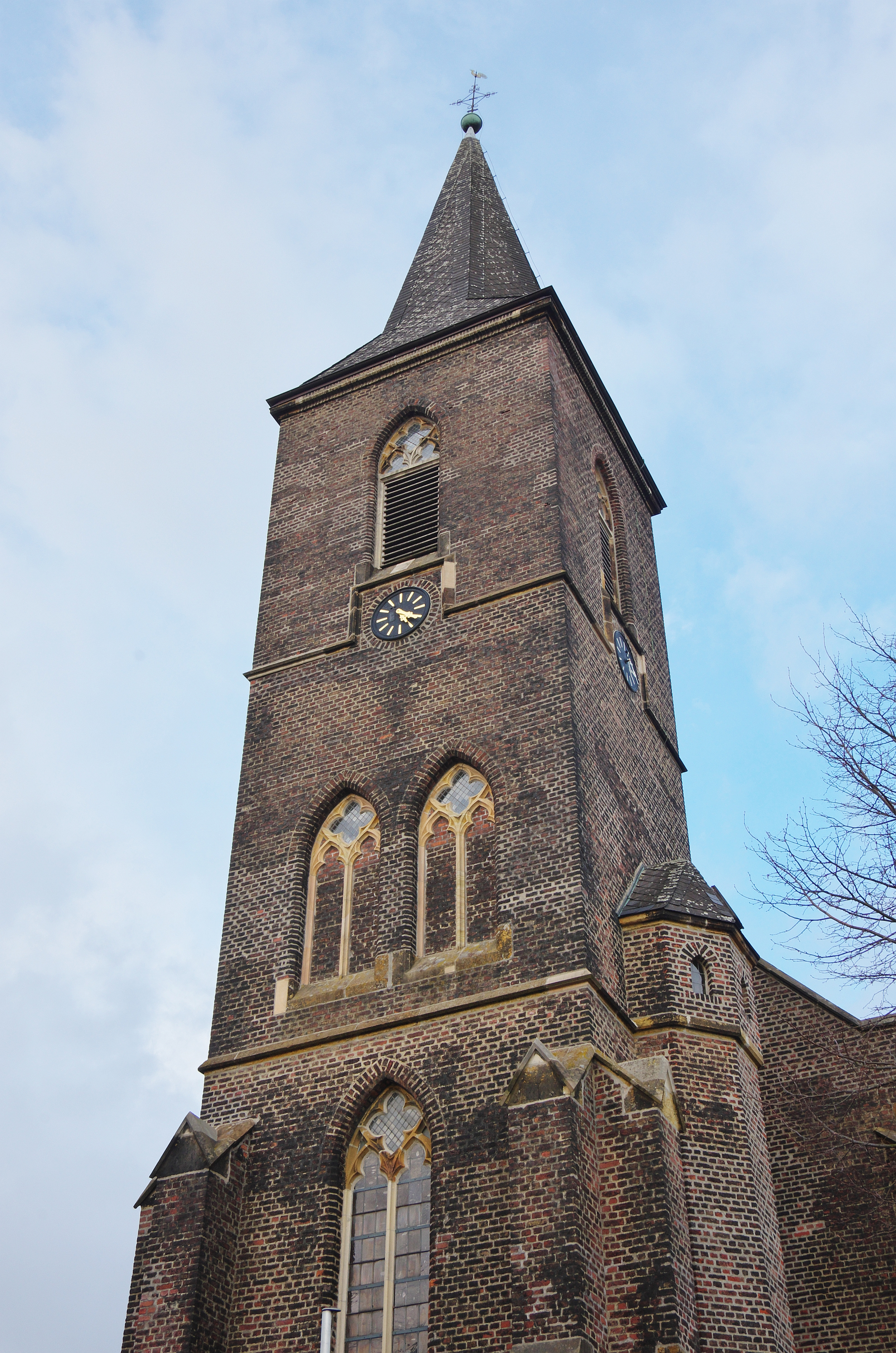 St Vitus in Sünnighausen.